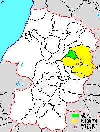 山形県北村山郡の位置。